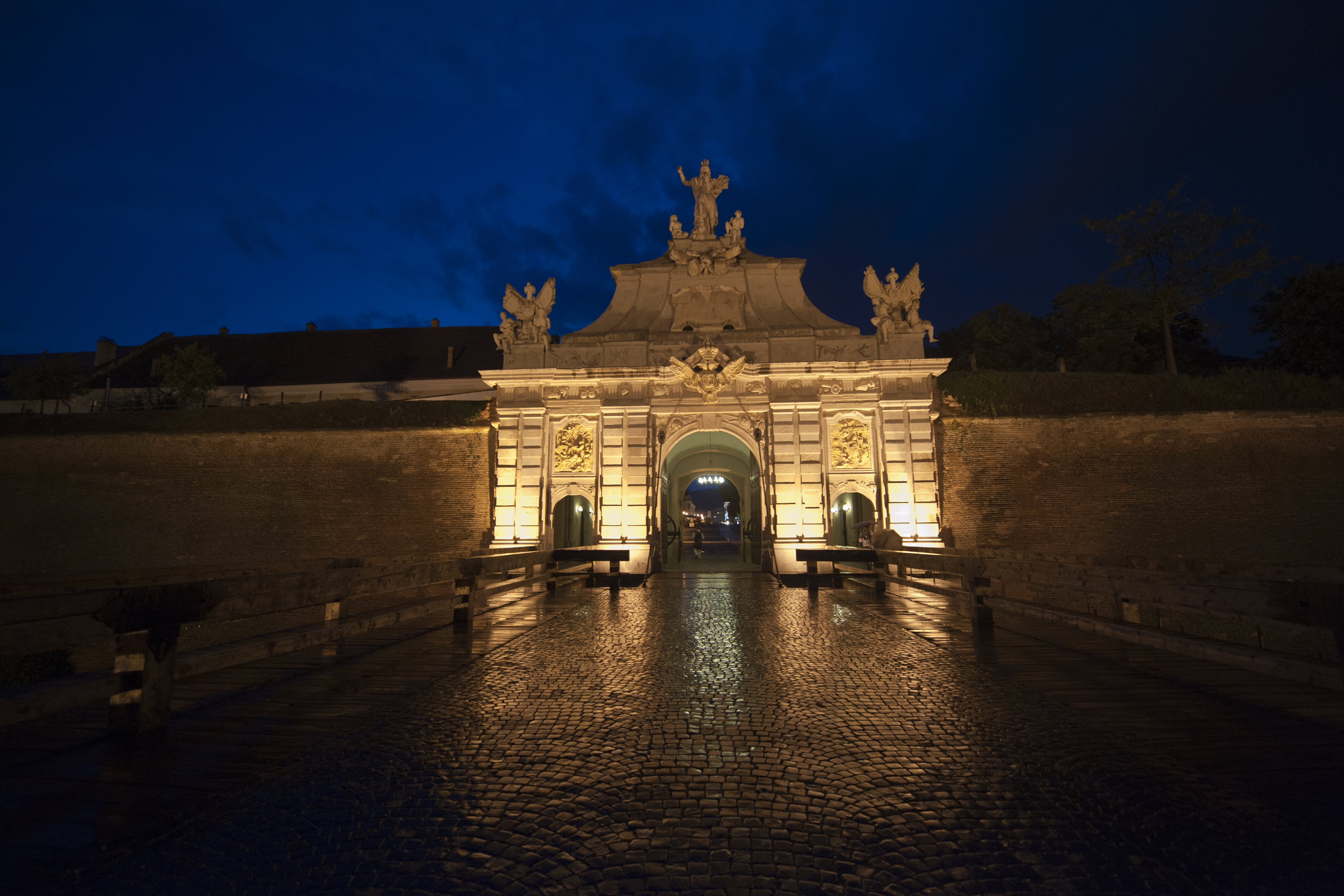 Ansamblul fortificației „Cetatea Alba Carolina”, cu toate componentele: ziduri, bastioane, porți, curtine, raveline, contragărzi, terase bastionare, șanțuri interioare și exterioare, contraescarpe.